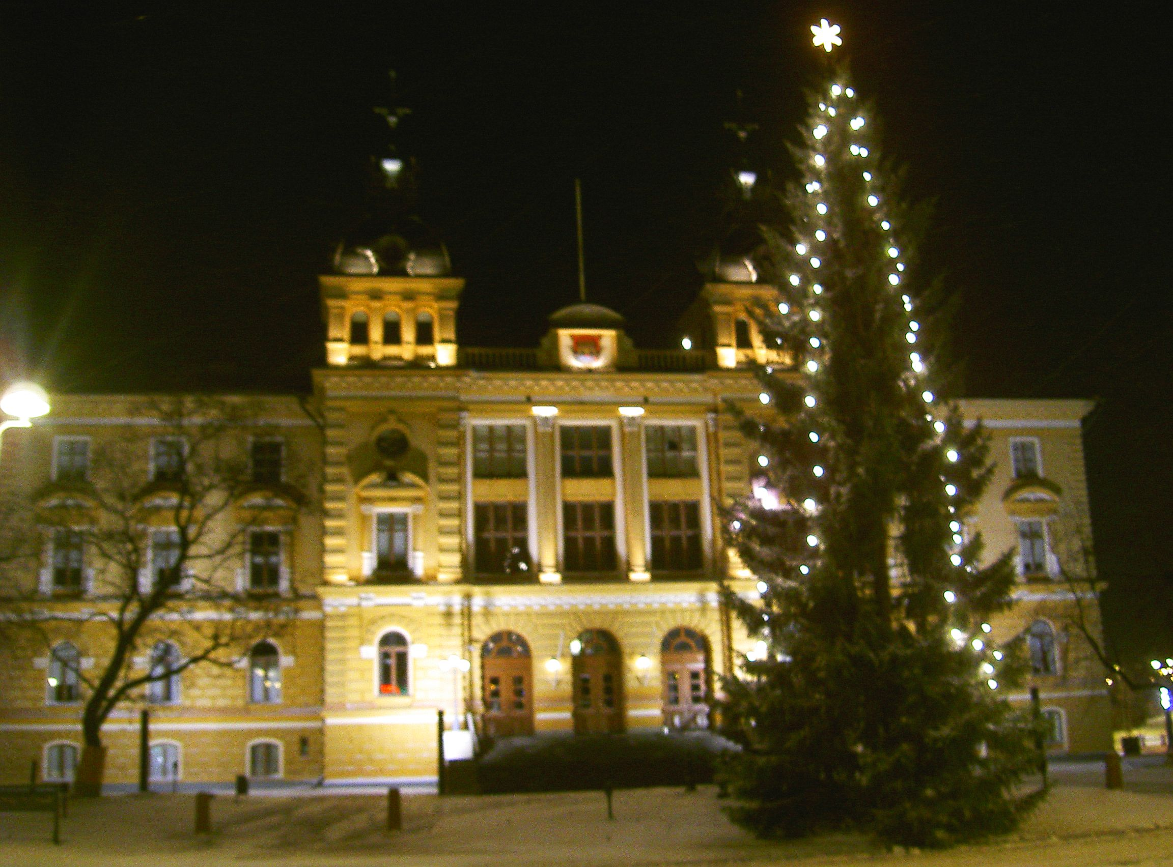 Oulu városháza, Finnország